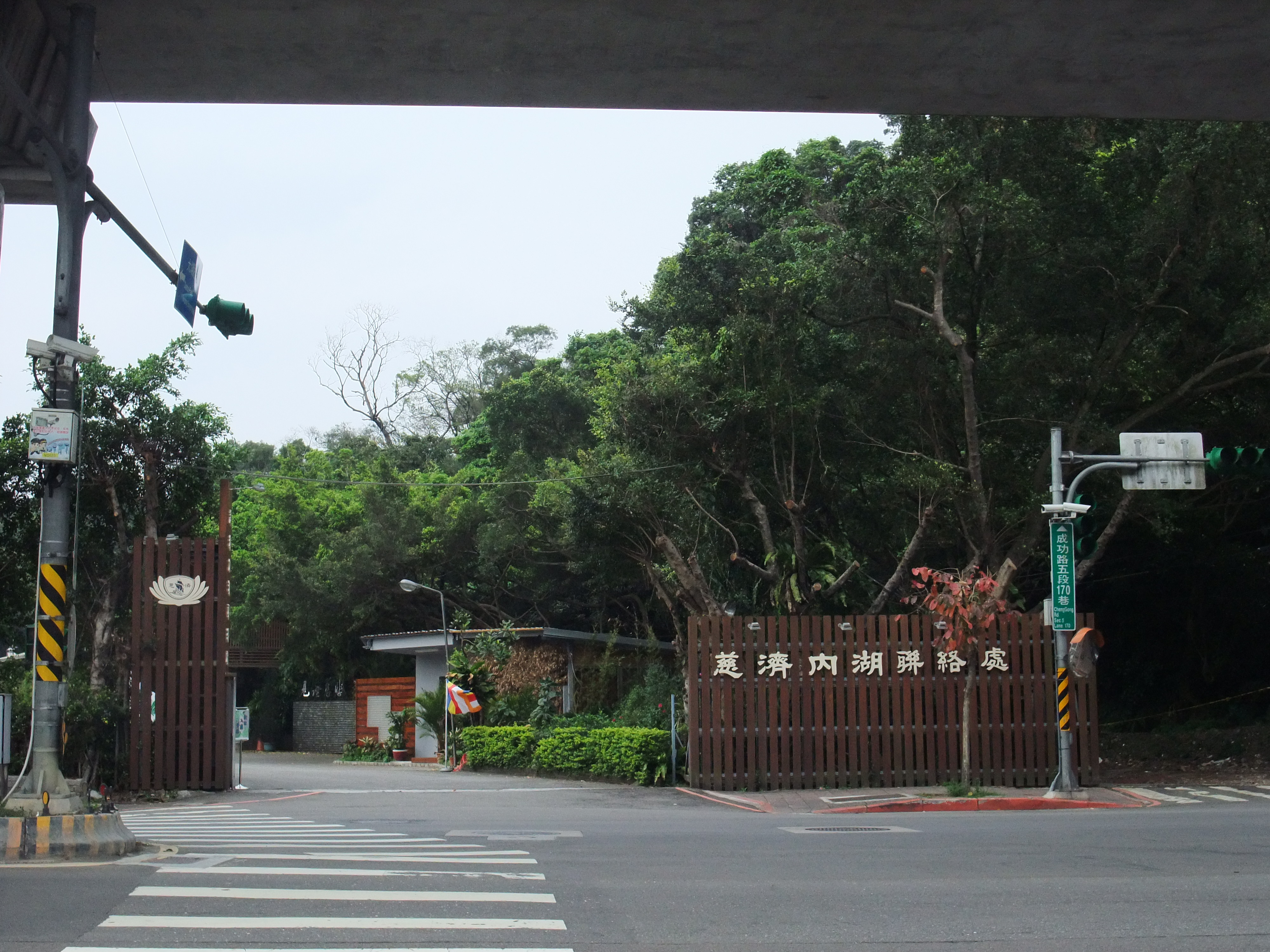 中文（台灣）: 慈濟內湖聯絡處門口，內部為預定的「社會福利特定區」